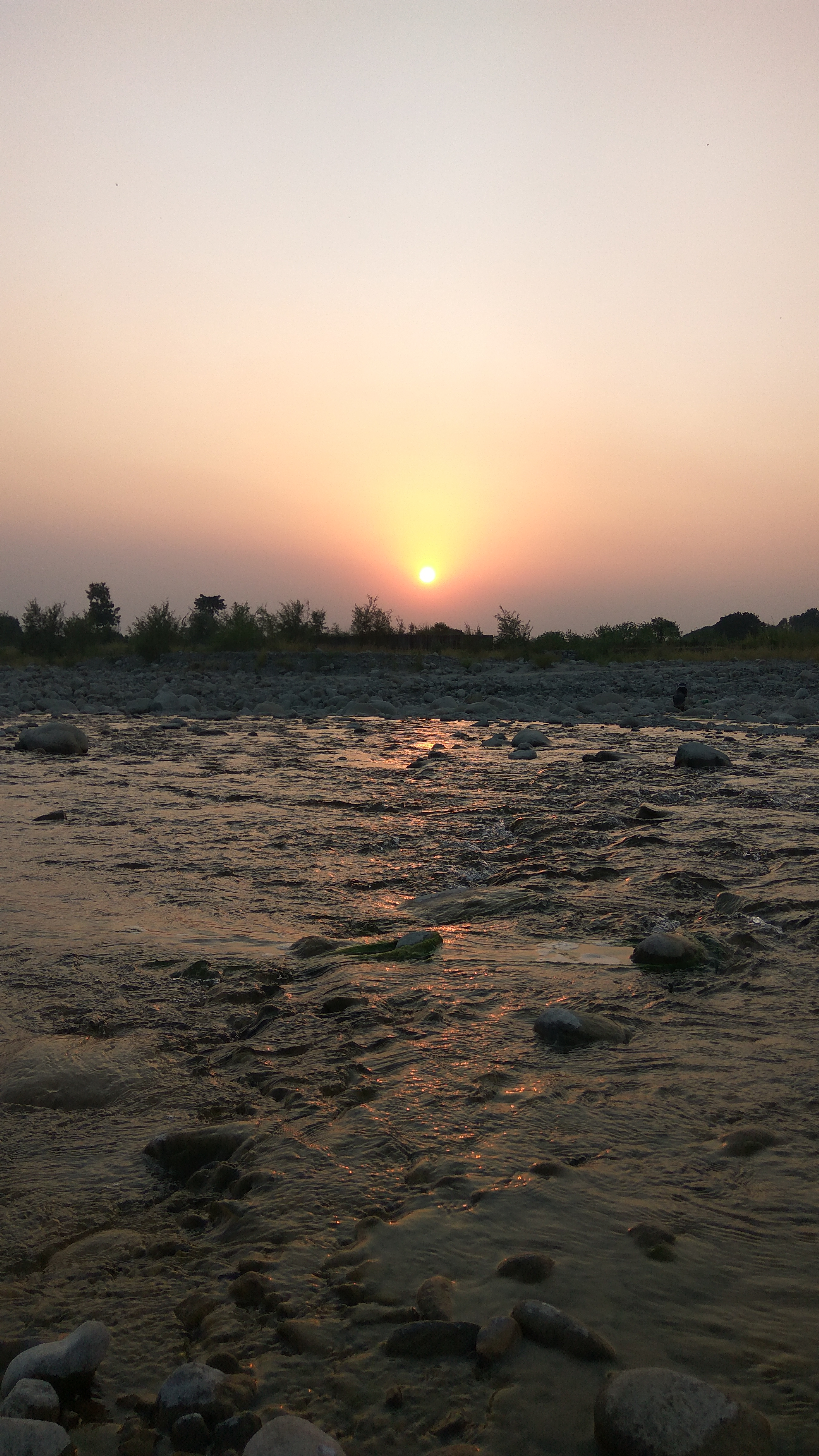 नन्धौर नदी से सूर्यास्त का दृश्य